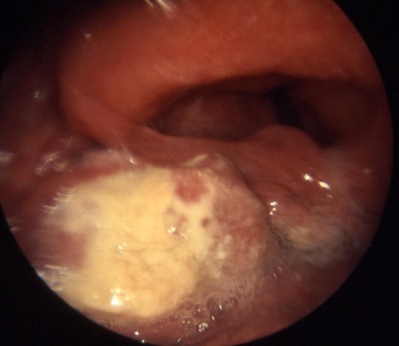 Hypopharynx Carcinom; oben Epiglottis, Mitte rechts Larynxeingang, unten links exophytischer Tumor aus dem linken Sinus piriformis